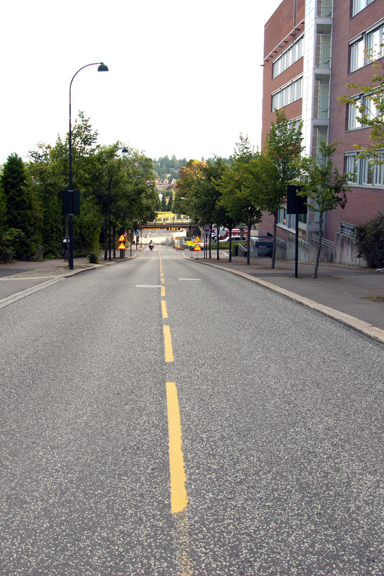 Sykehusbakken på Fylkesvei 459 Halfdan Wilhelmsens allé i Tønsberg.